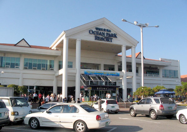 행담도 휴게소의 모습.